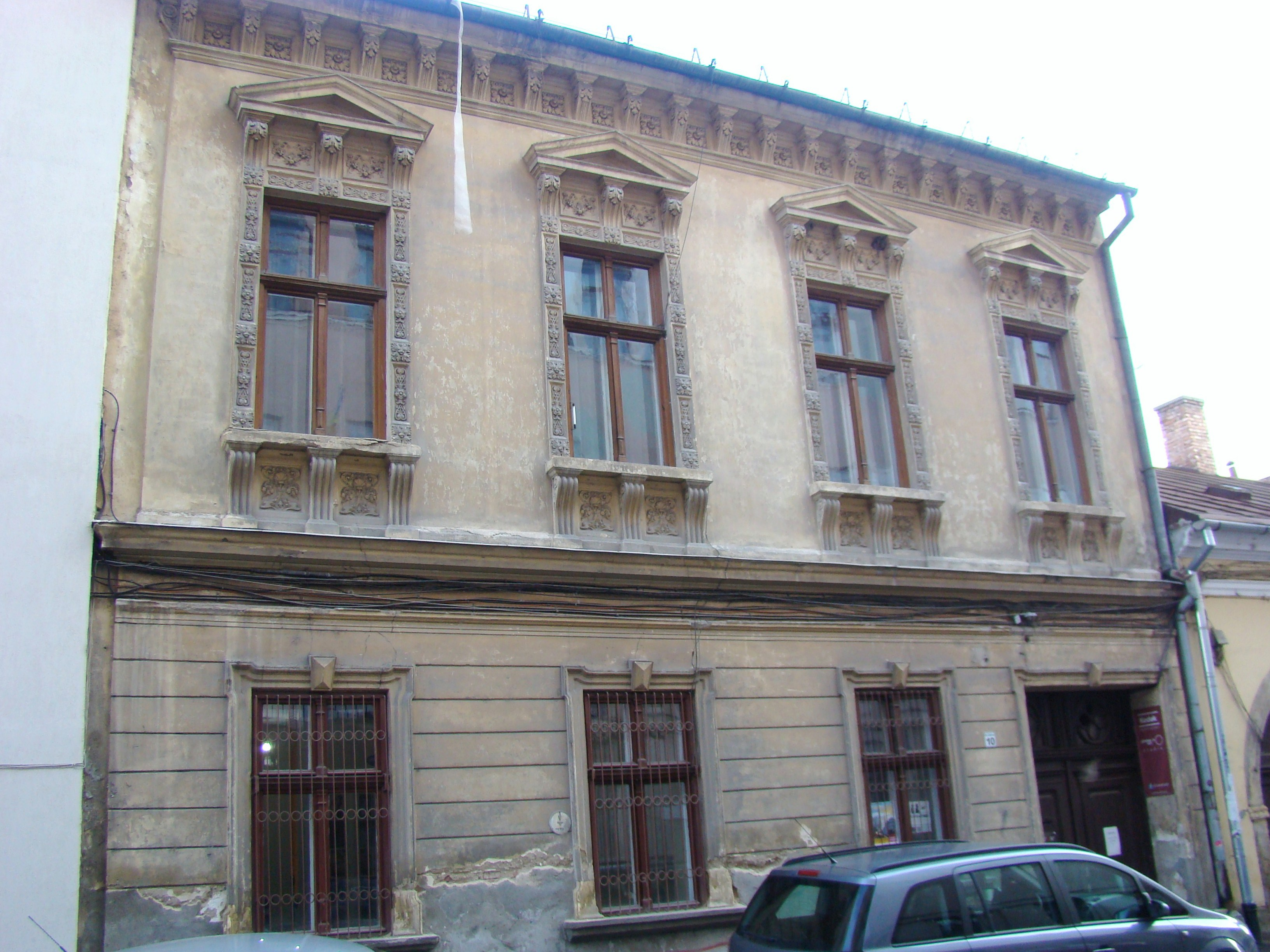 Casă monument strada I.C.Brătianu nr.10